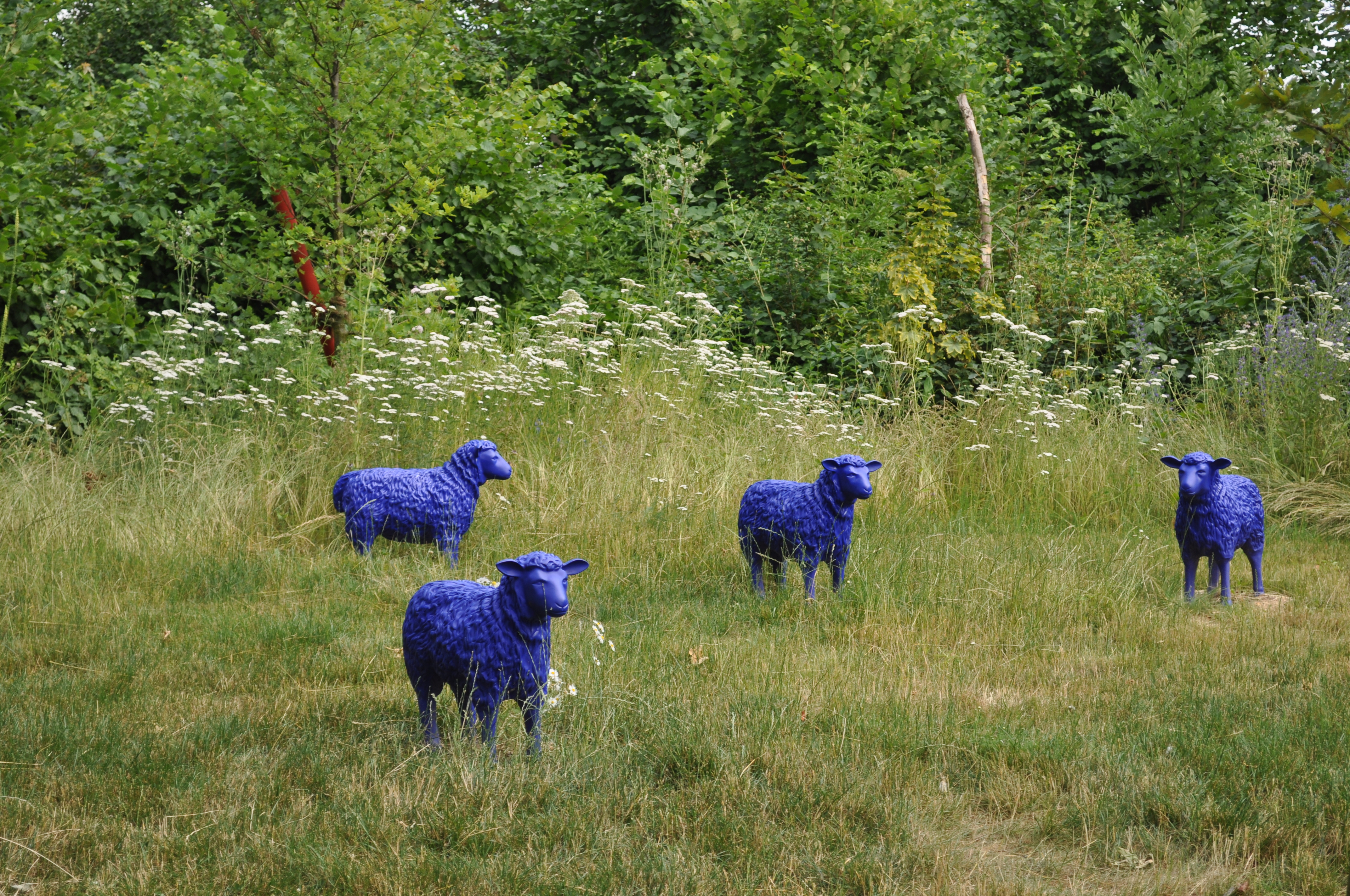 Landesgartenschau 2010 in Bad Nauheim: Blaue Schaafe